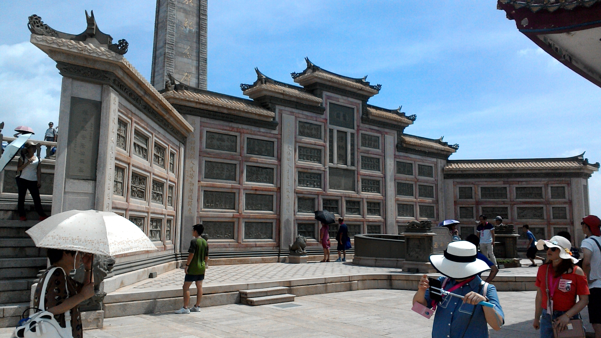 陳嘉庚墓墓壙,福建省廈門市集美區集美街道潯江社區